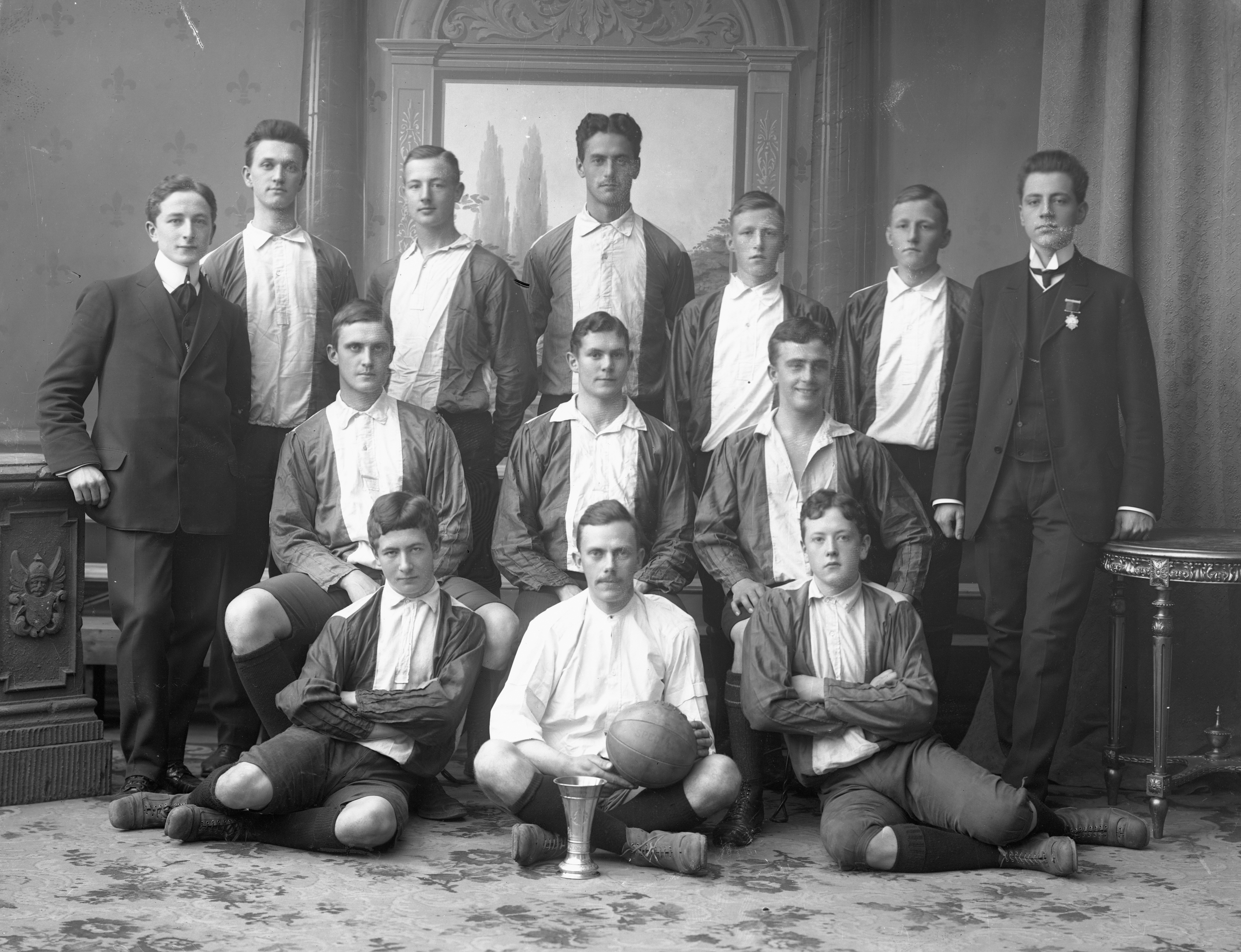 FC- Lyn norgesmestere i 1908